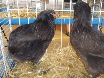 Poules araucana sauvage doré foncé